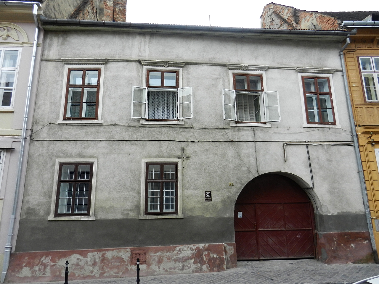 Casă monument istoric